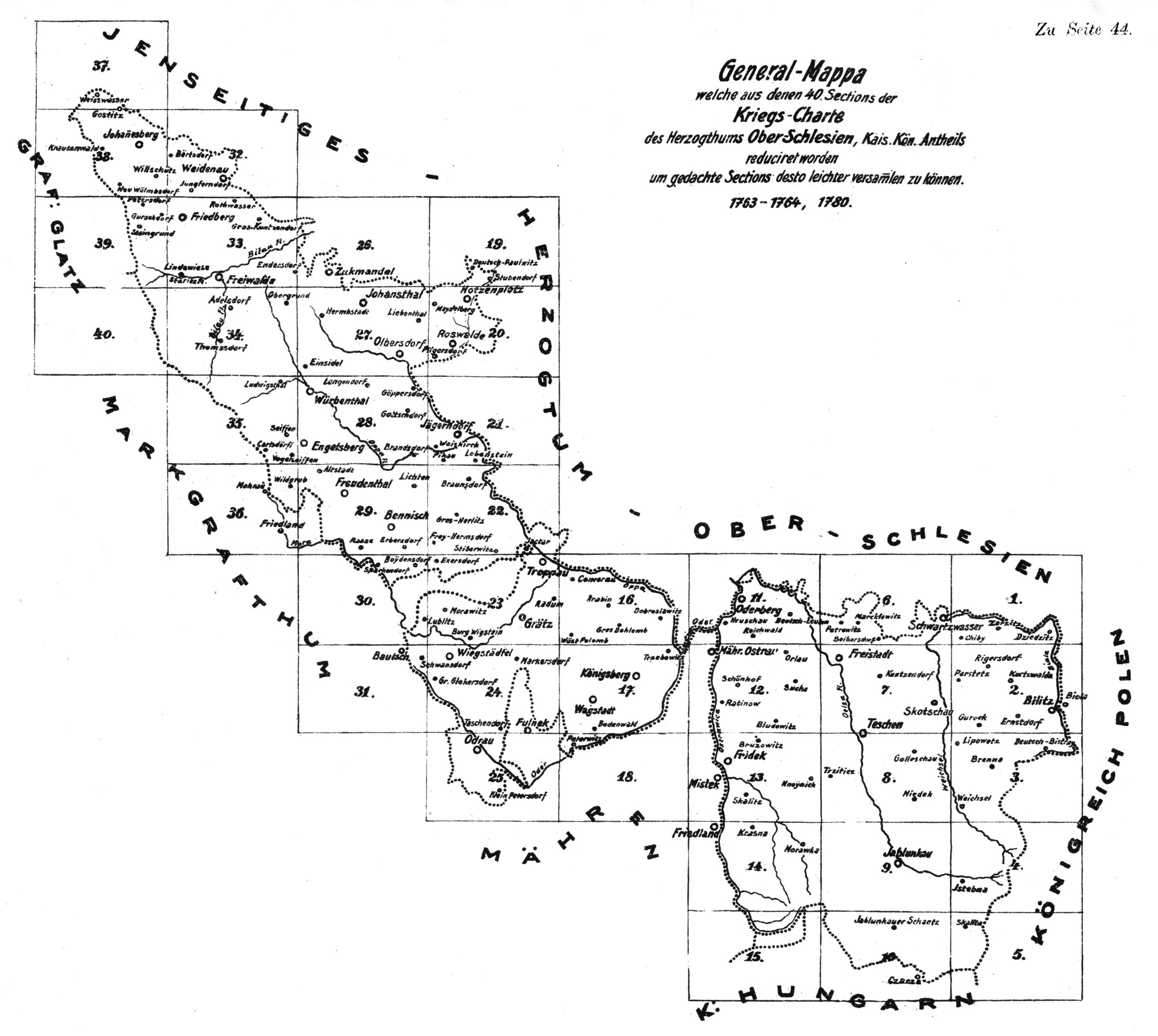 Harta generală a Sileziei superioare(de Sus) în hărţile iozefine, executată între anii 1763-64 şi 1780.